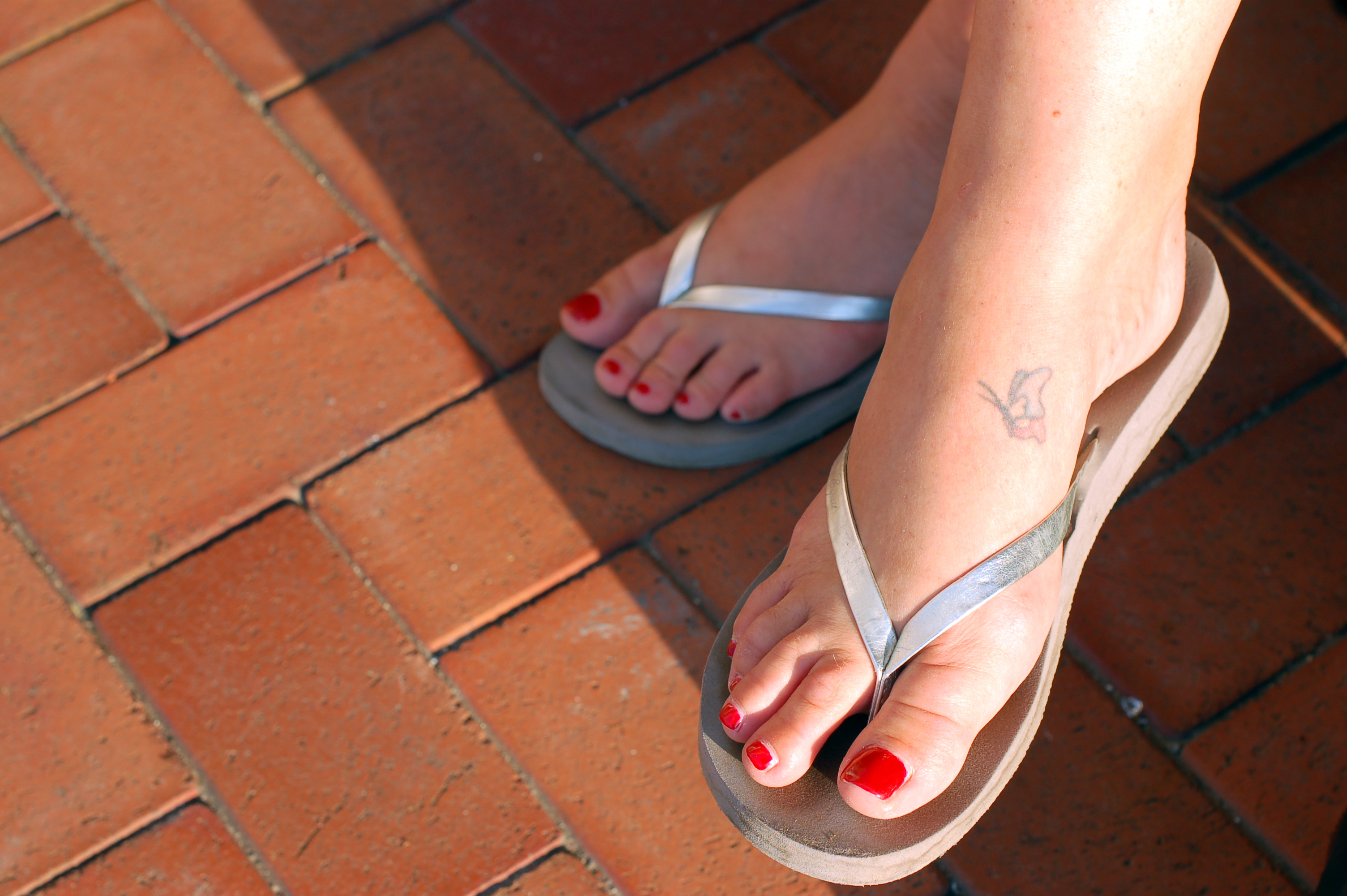 Wikimania Gdansk 2010